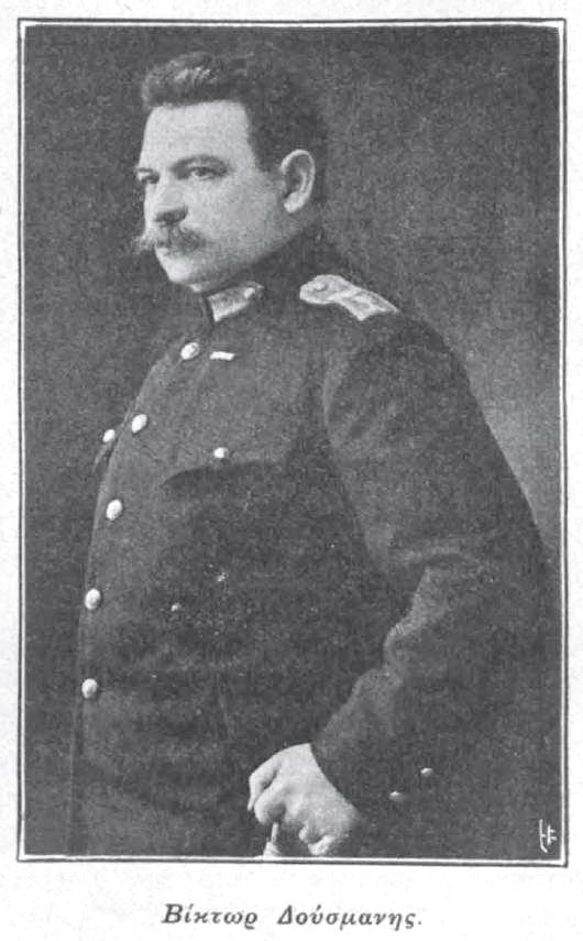 Griechischer Militär